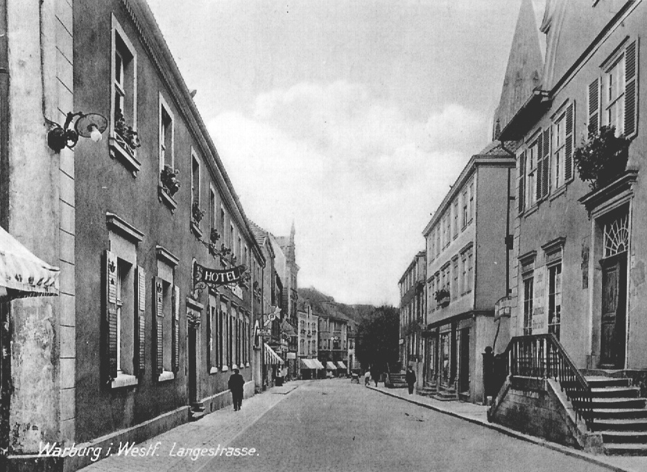 Warburg, Hotel Zum Desenberg um 1920